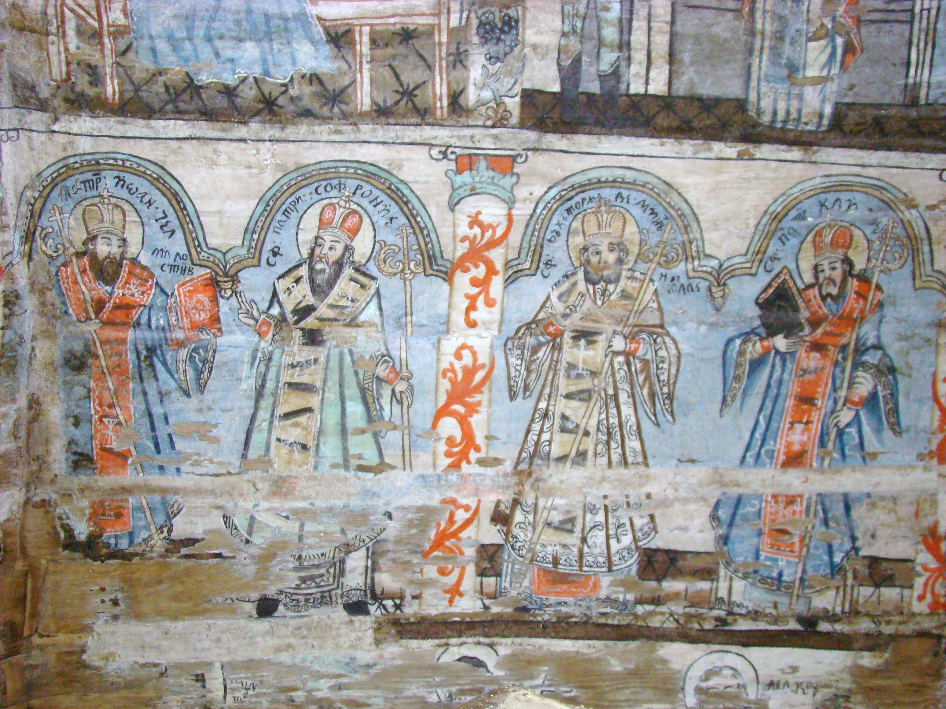 Biserica de lemn "Intrarea Maicii Domnului în Biserică" , sat BÂRSANA